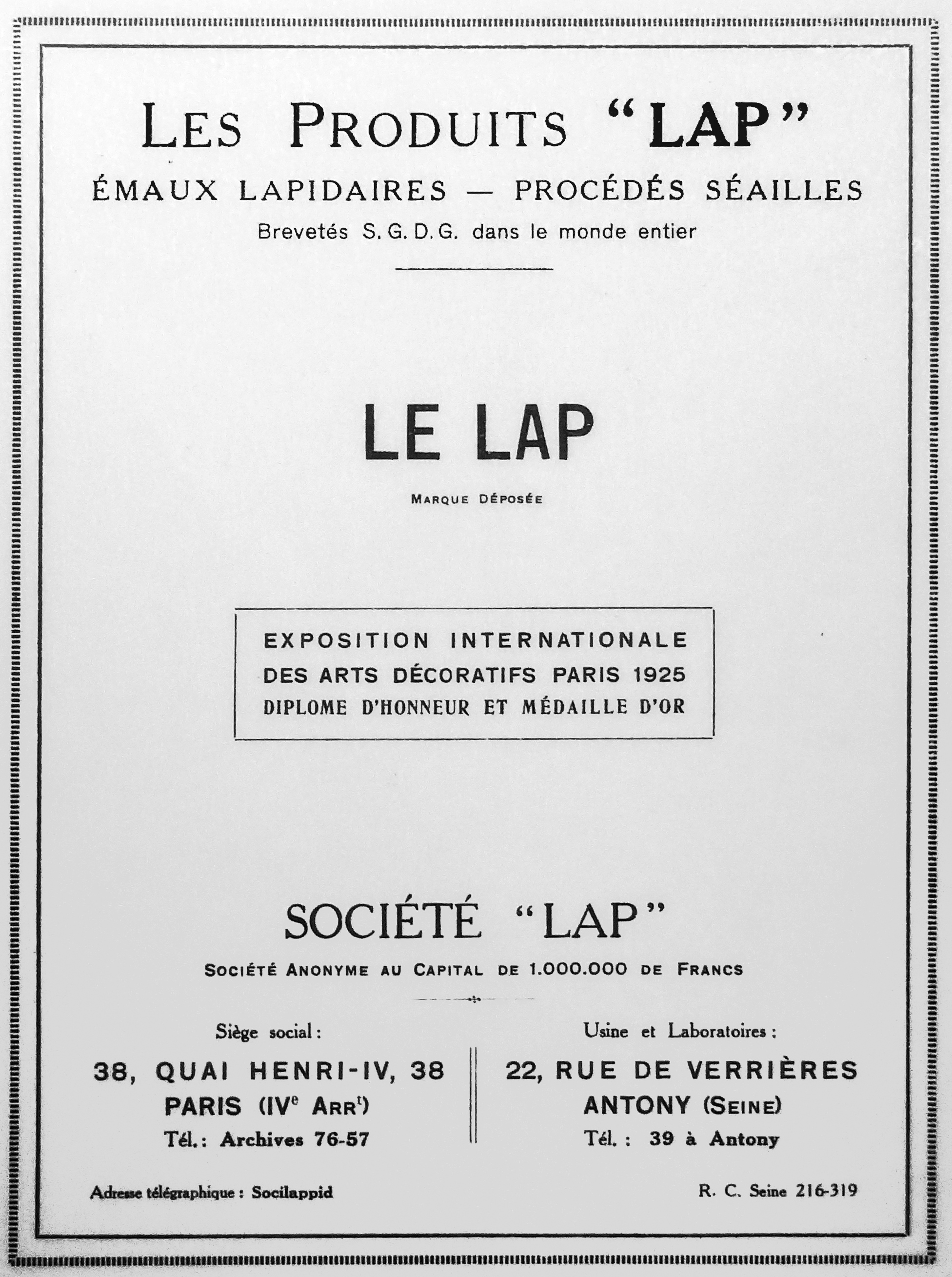 Document de présentation de la technique Lap Le Lap est un dérivé du ciment mis au point en 1923 à Antony par l’ingénieur Jean-Charles Séailles (1887-1967) et son épouse, la cantatrice Spéranza Calo (1885-1947). C’est un matériau de synthèse qui donne au ciment un aspect semblable à l’émail. Il a été utilisé jusqu'en 1938 pour décorer des devantures de magasins ou pour des revêtements intérieurs. Le Lap a servi également dans l'ameublement. Il est étroitement associé au style art déco. Plusieurs artistes renommés ont créé des modèles qui ont été transposés avec le procédé Lap comme Dufy, Foujita, Janniot, Jouve, Gruber ou les frères Martel.